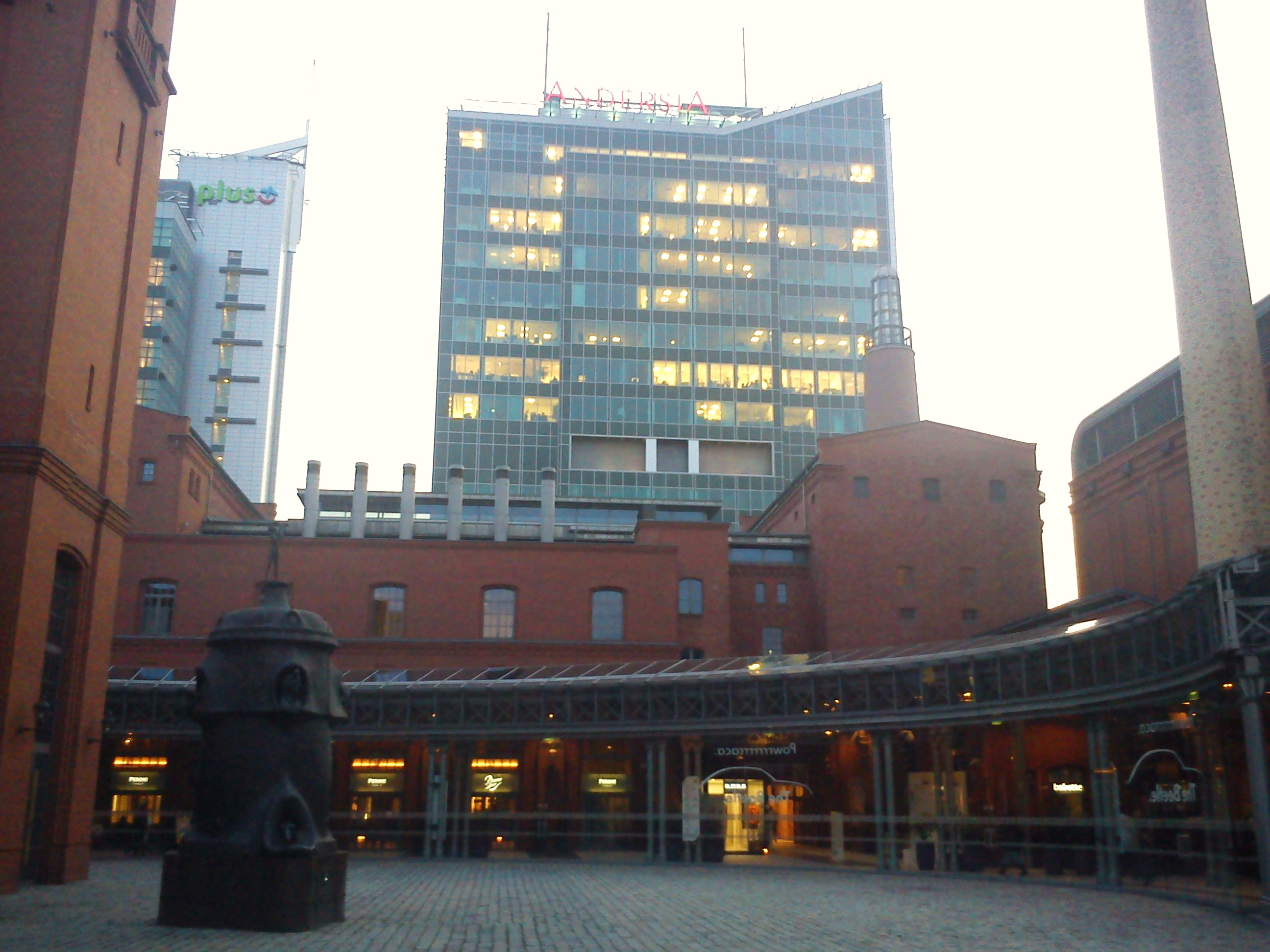 Stary Browar/Andersia Tower. Poznań.